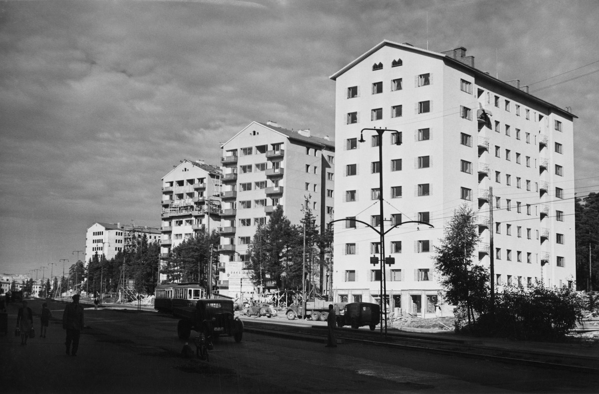 Aravataloja rakennetaan Keskuspuiston laitaan Mannerheimintiellä.